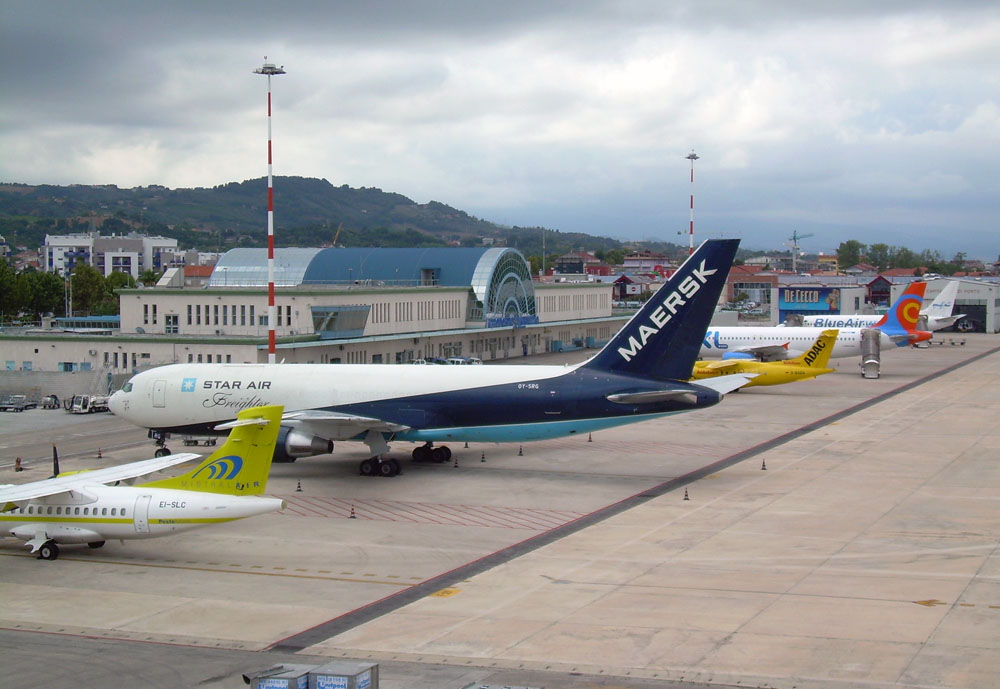 Apron principale - Aeroporto di Pescara